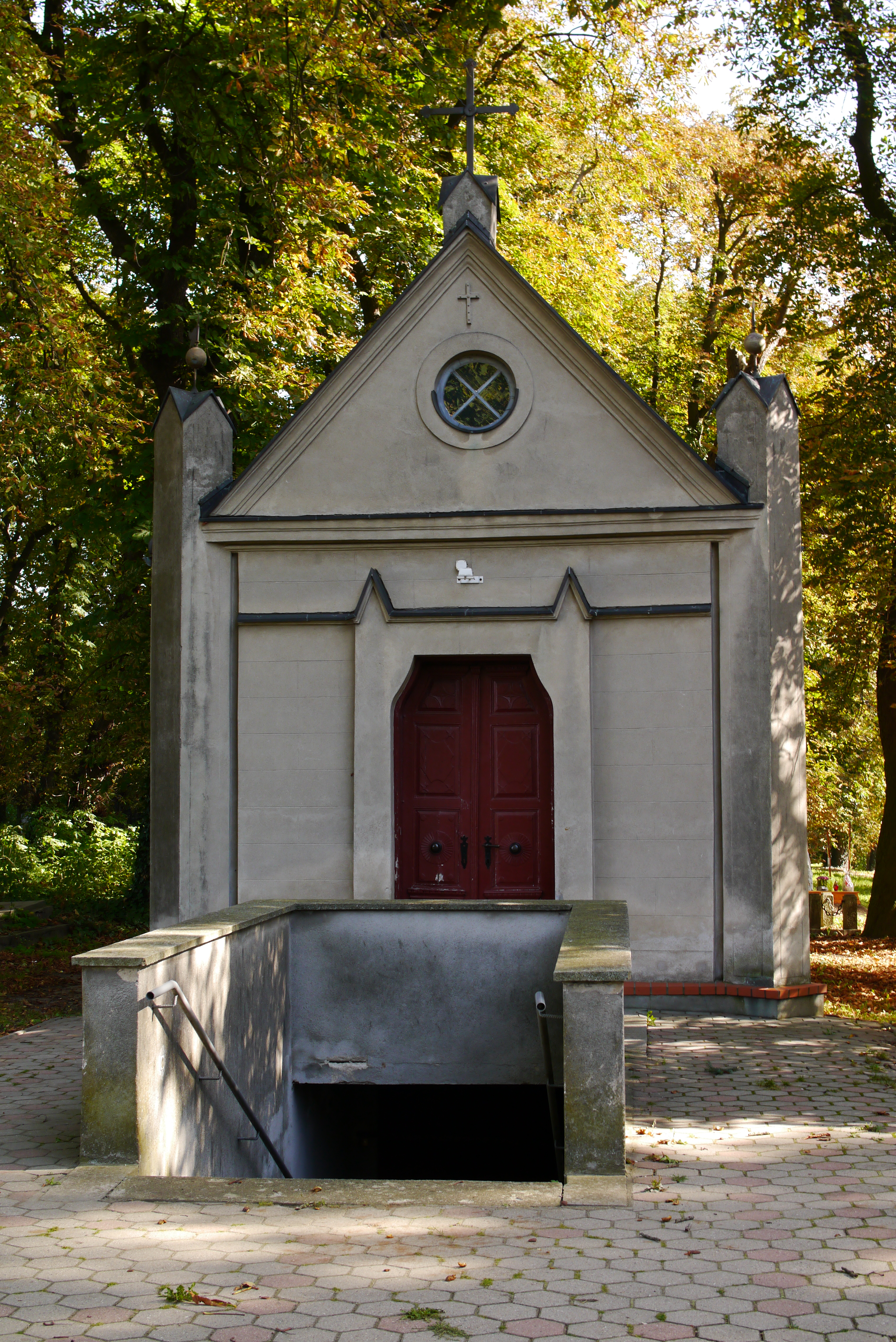 Kcynia, kaplica cmentarna, XIX